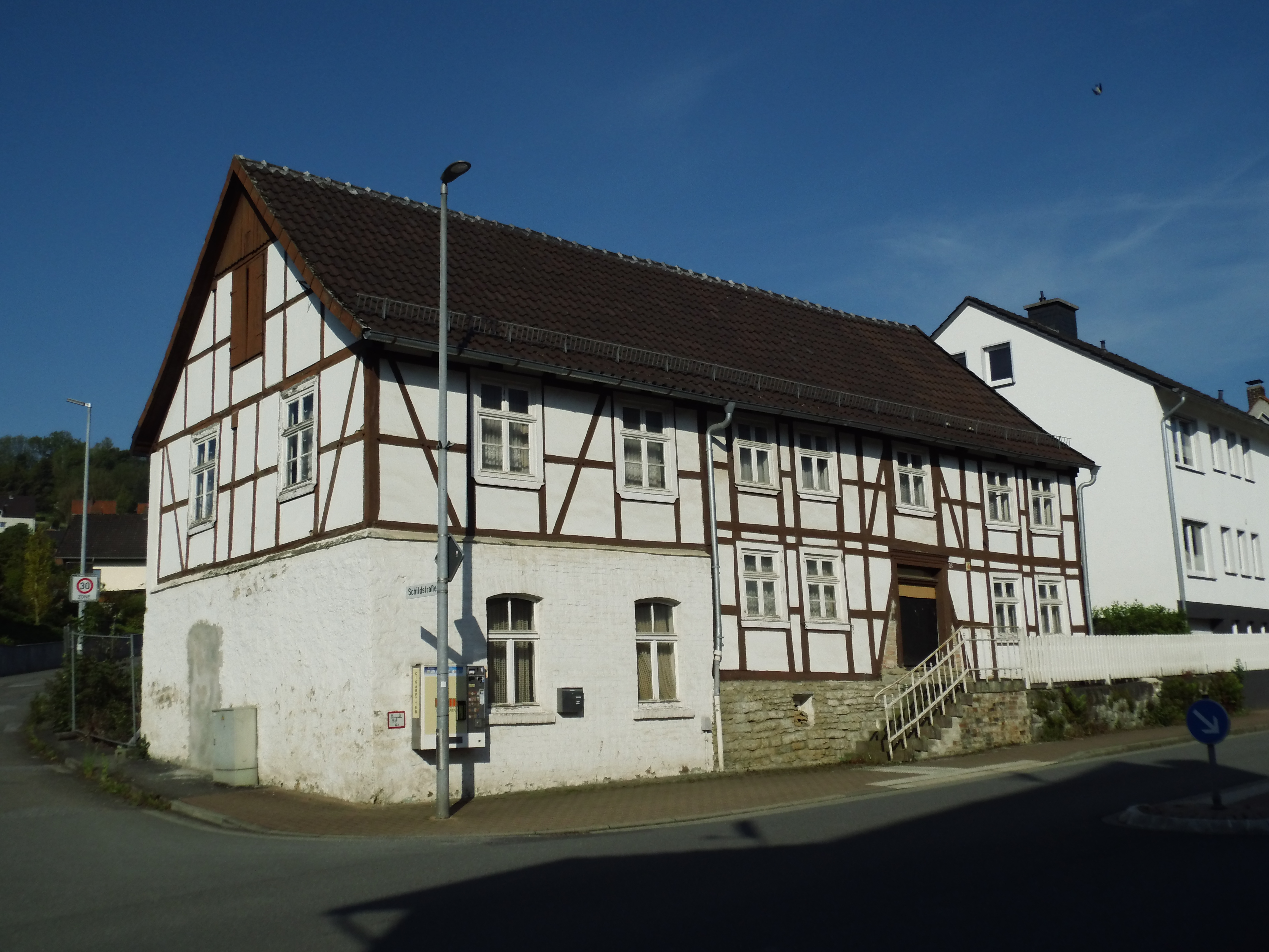 Baudenkmal, Liste der Baudenkmäler in Beverungen Nr. 88